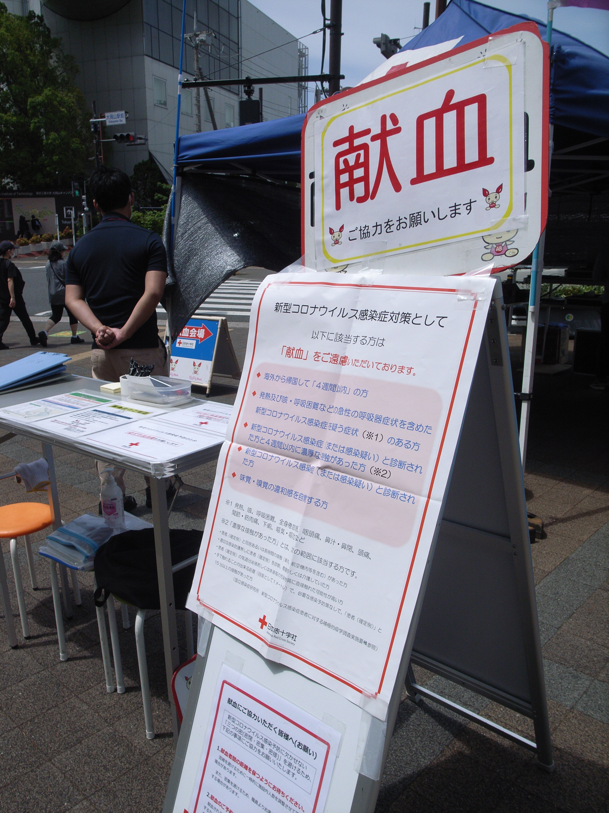 東工大に所用があり訪ねた際、キャンパス前で献血の協力を呼びかけていたが、献血者が新型コロナウイルスに感染していた場合は血液が汚染されている可能性があるため、採血前に確認を求めていた。